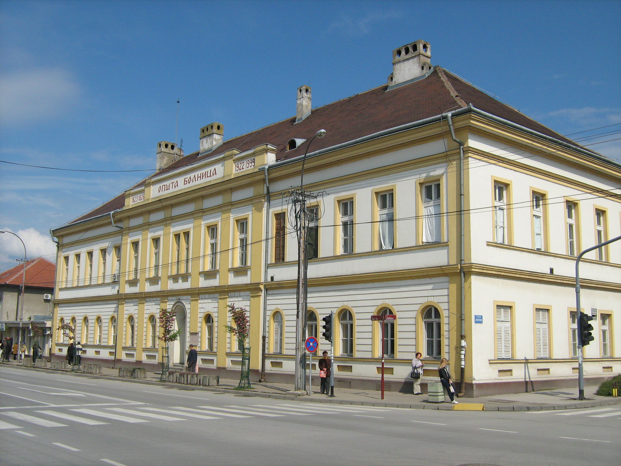 зграда болнице